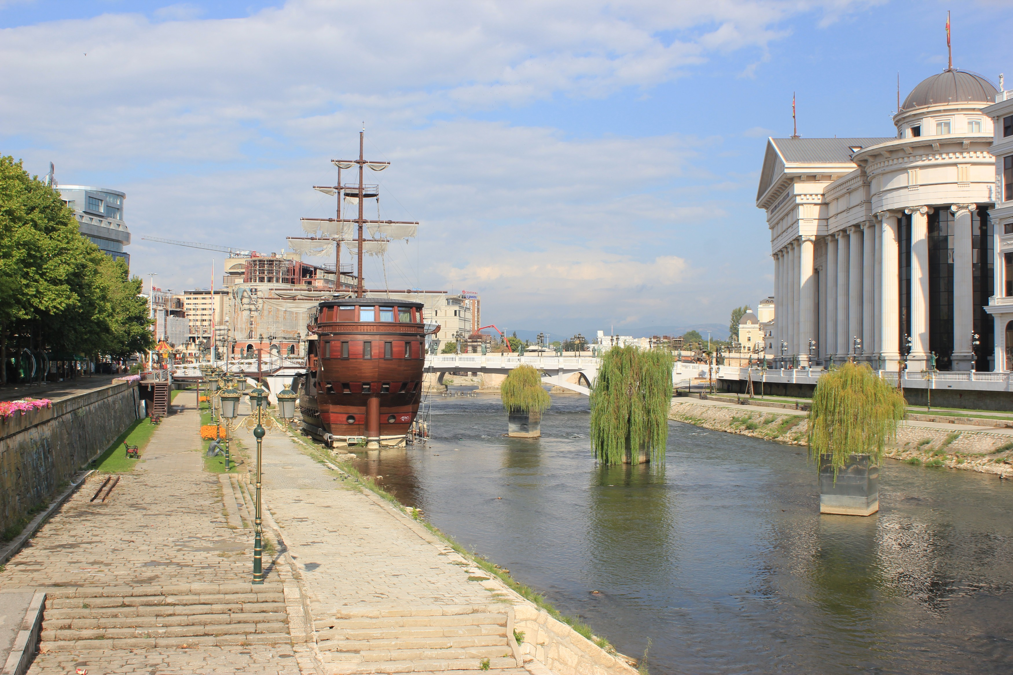 Der Vardar mit einem der drei Vergnügungsschiffe und dem Archäologischen Museum in Skopje.